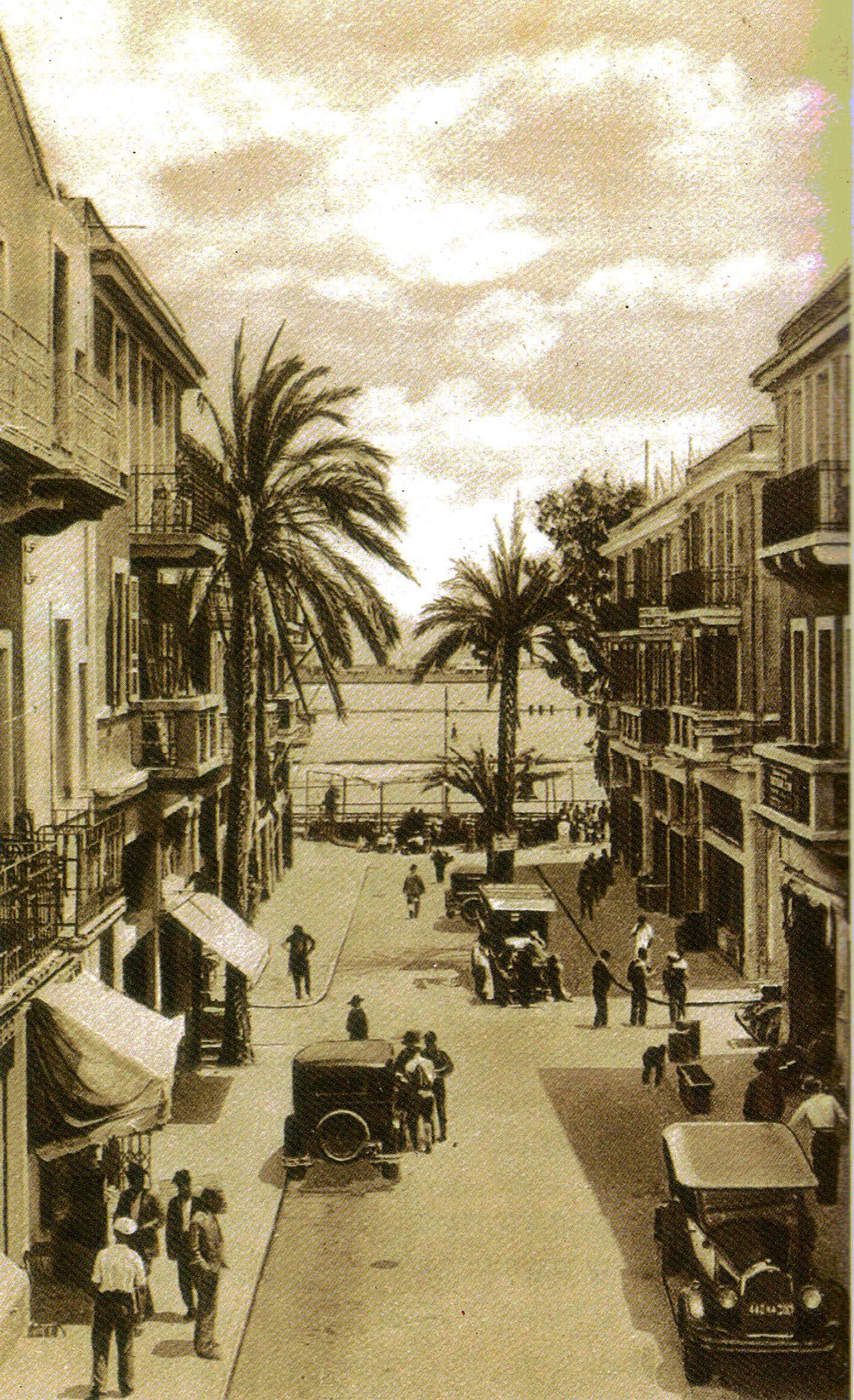 המרכז המסחרי הישן בעיר התחתית בחיפה בשלהי שנות ה-20 של המאה ה-20